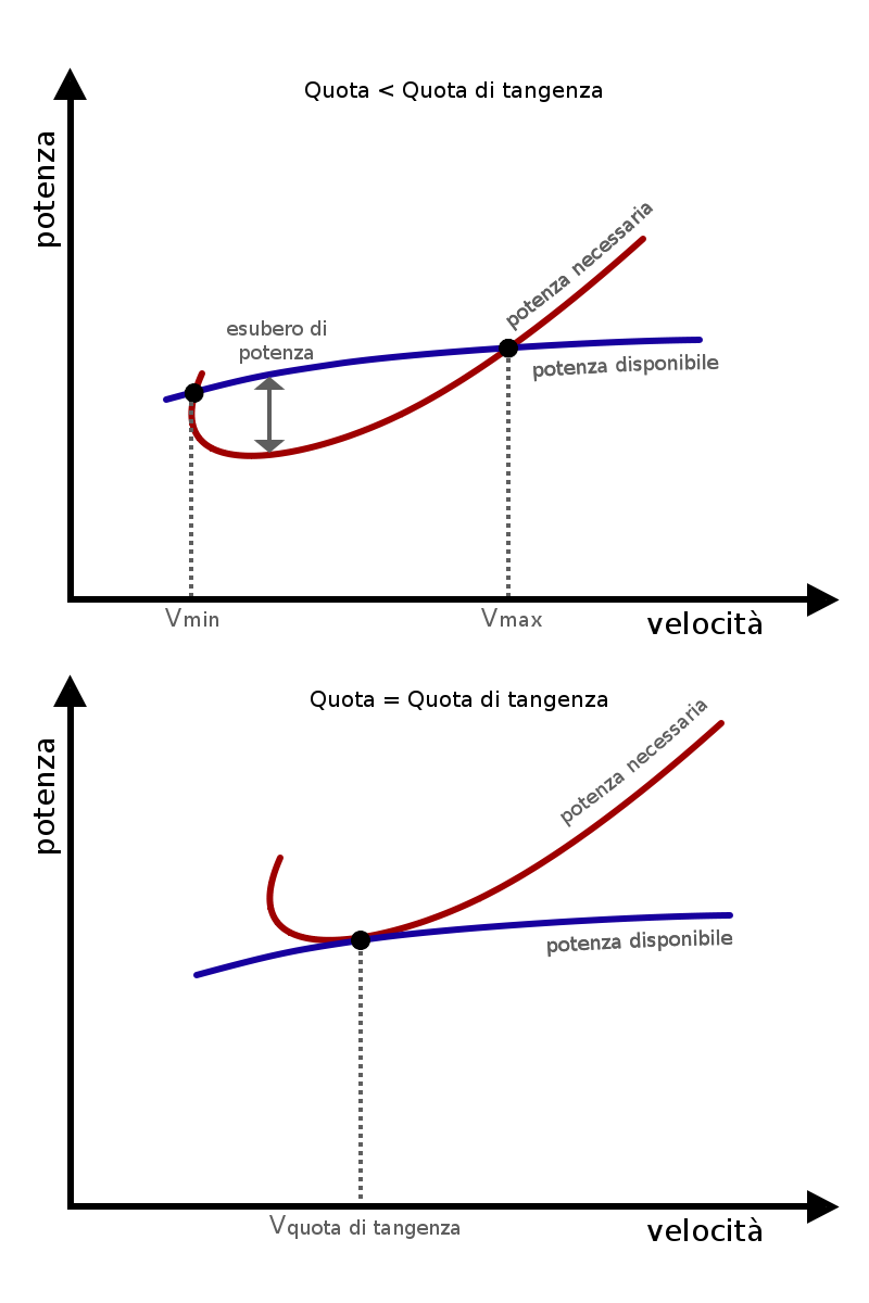 Grafico riportante la potenza necessaria e la potenza disponibile al volo orizzontale rettilineo da un velivolo propulso da elica a quota generica e a quota di tangenza.